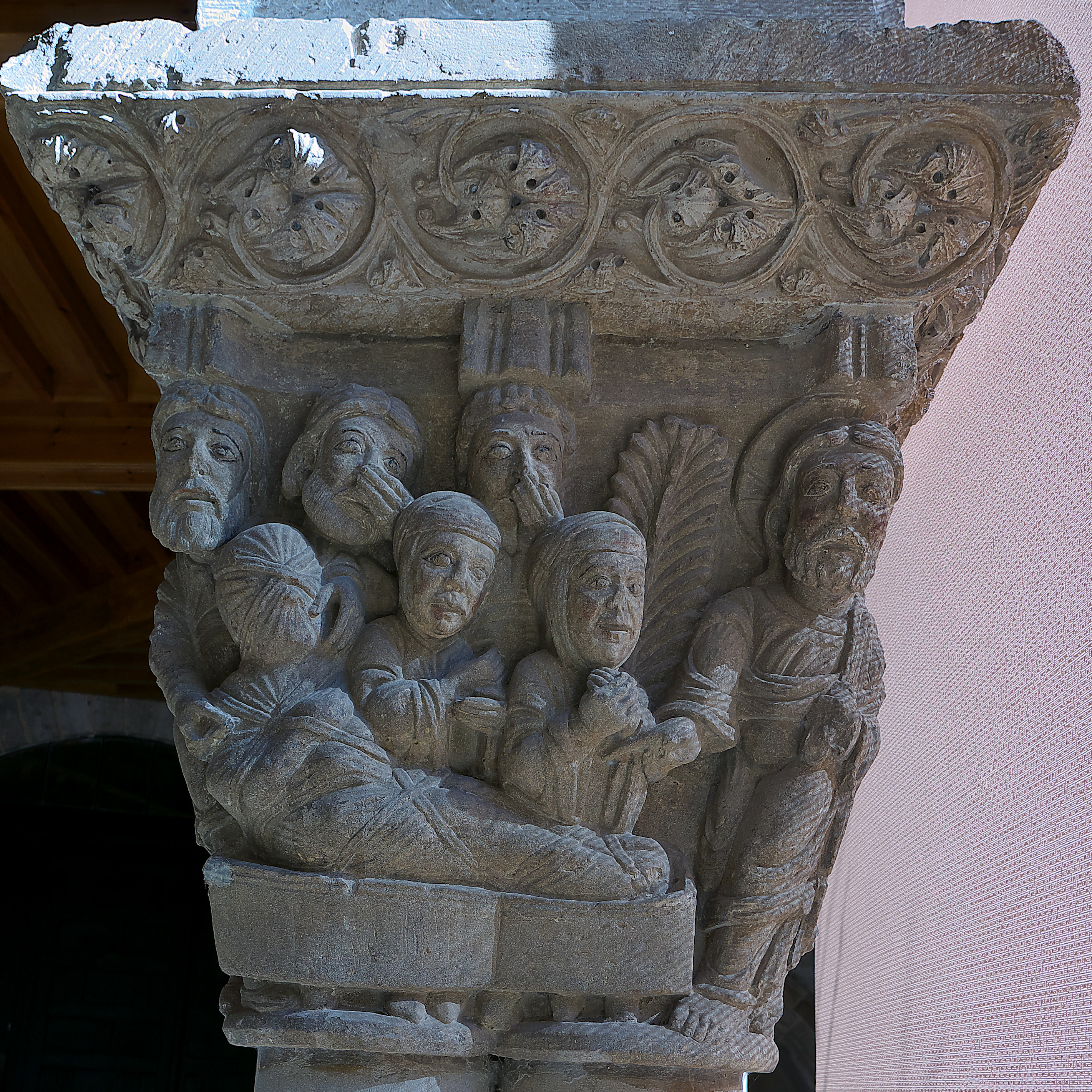 Cristo señala a Lázaro muerto. Claustro de la Catedral de Santa María de Tudela (1194-1200).